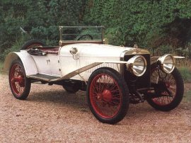 Hispano-Suiza Alfonso XIII 15/45 CV